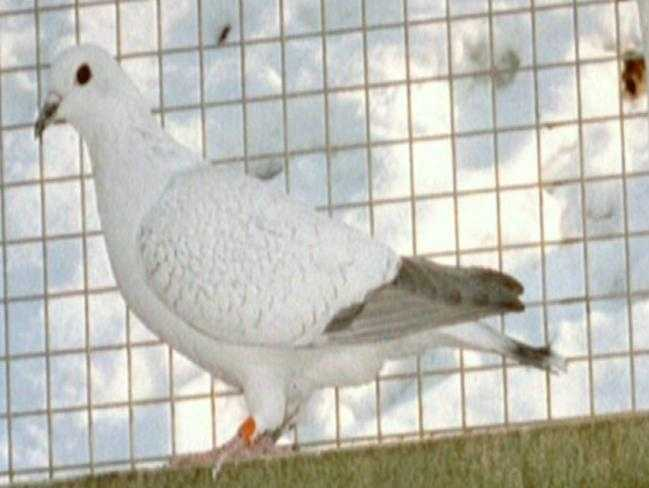 Eistaube, weißgeschuppt (Taubenrasse)